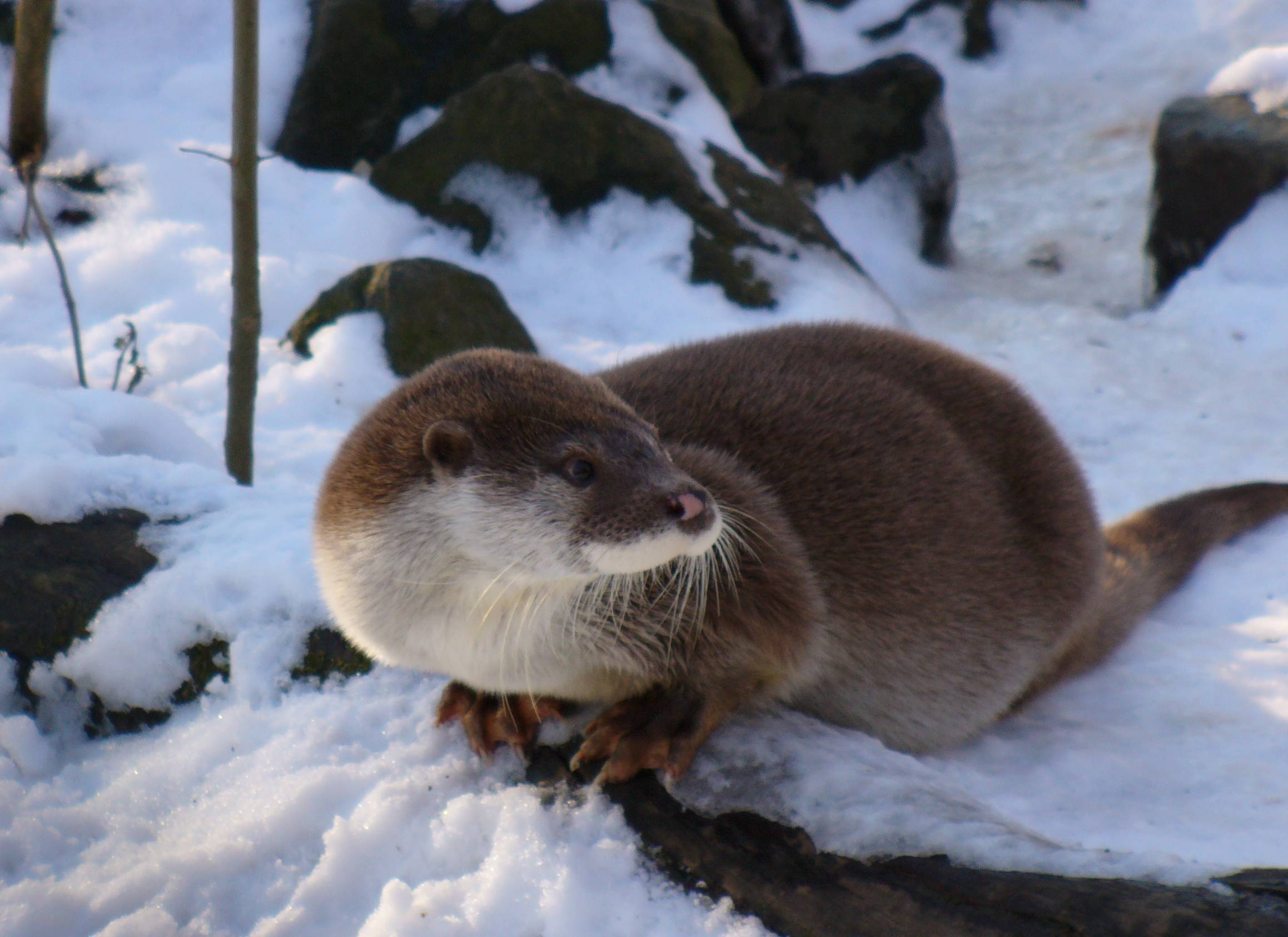 european otter (Lutra lutra)